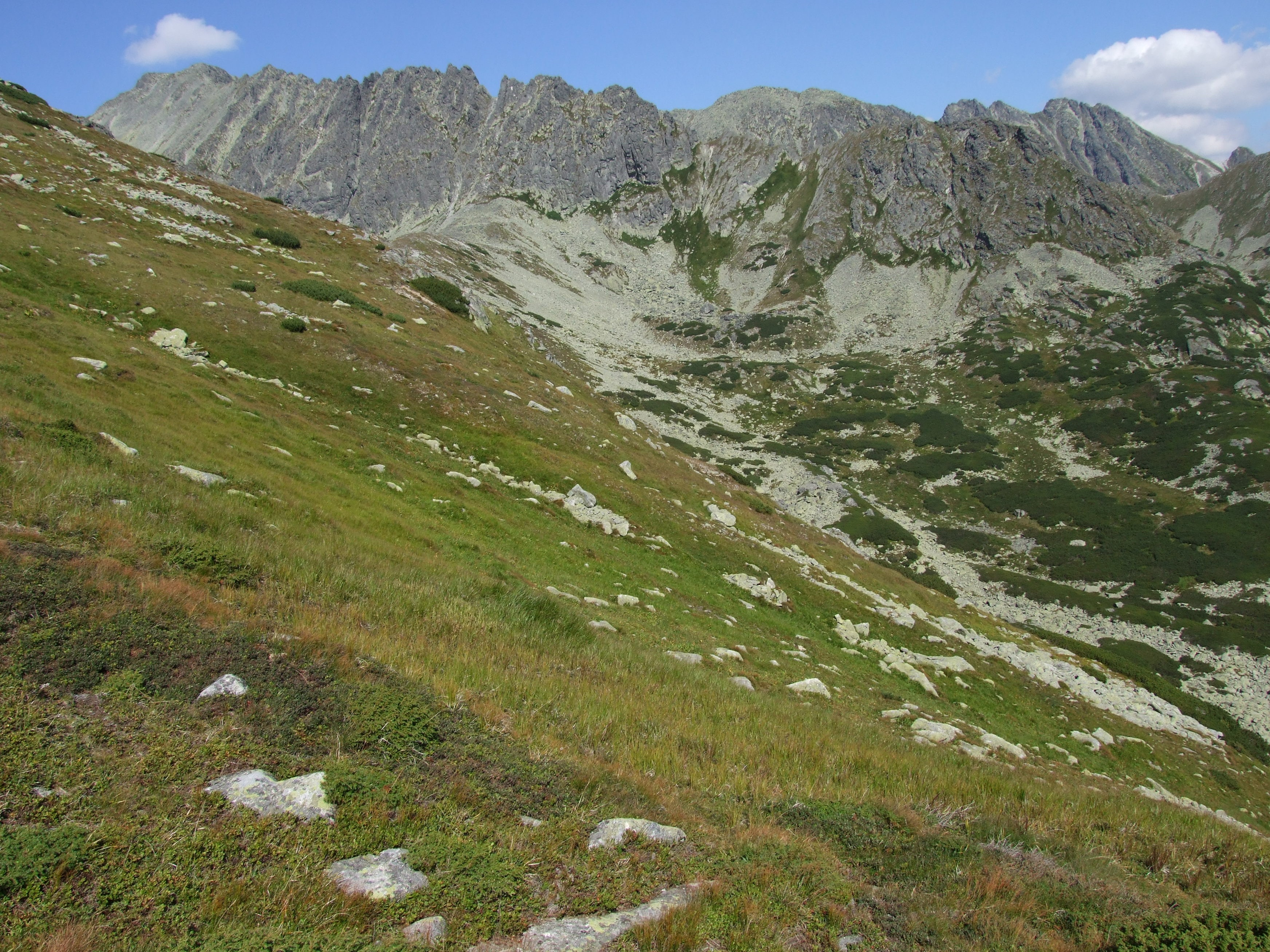 Dolina Ważecka i Jamska Grań, widok z Pawłowego Grzbietu